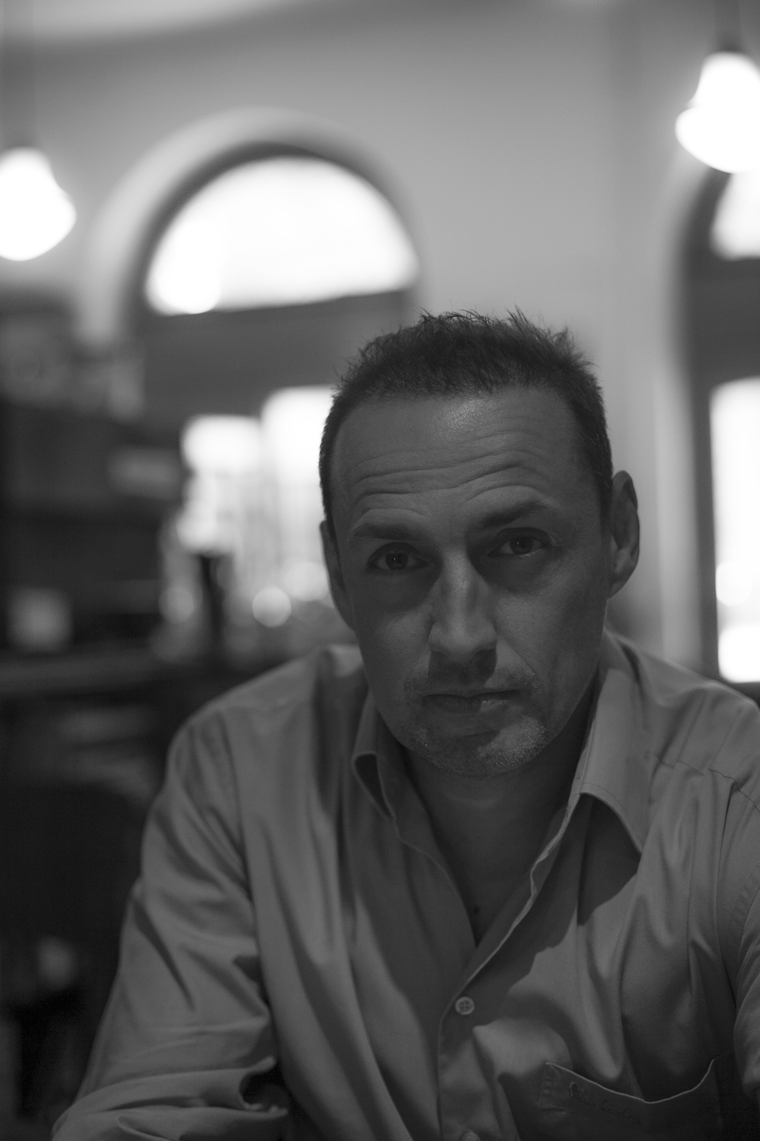 portré_készítette: Tihanyi Anna